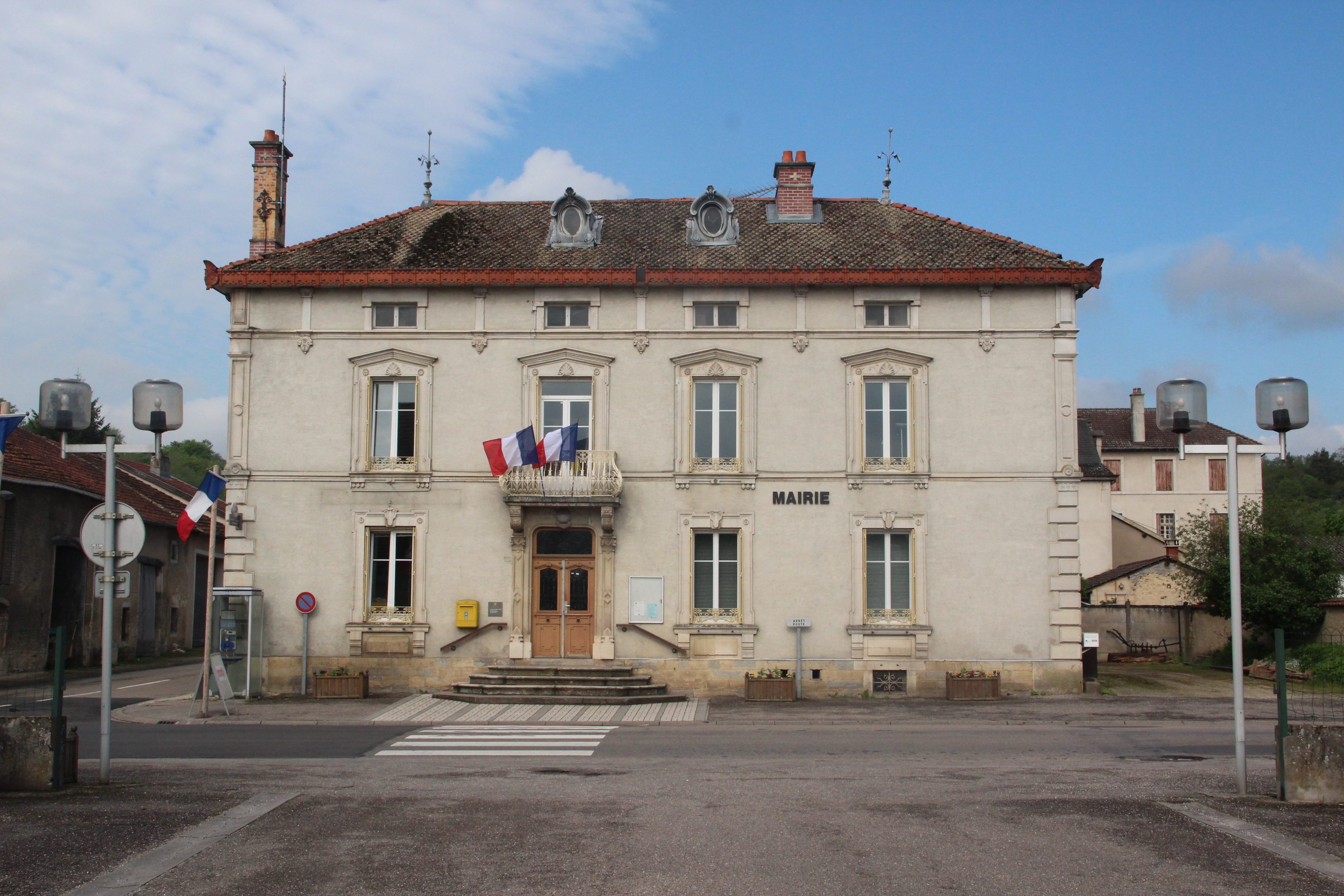 Jakobsweg by Niederkasseler France ----- Domremy-la-Pucelle